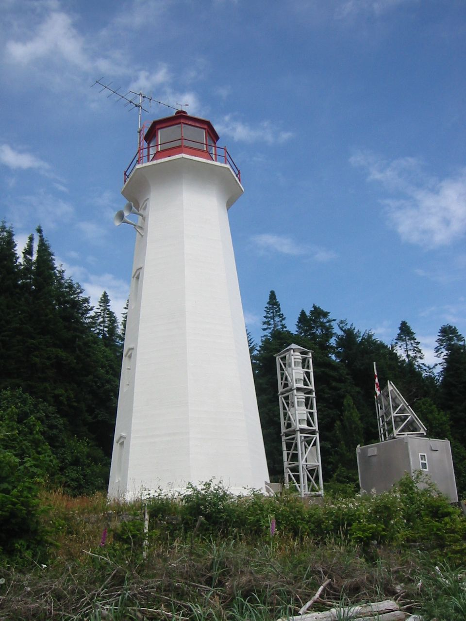 Elk Falls-Quadra Island